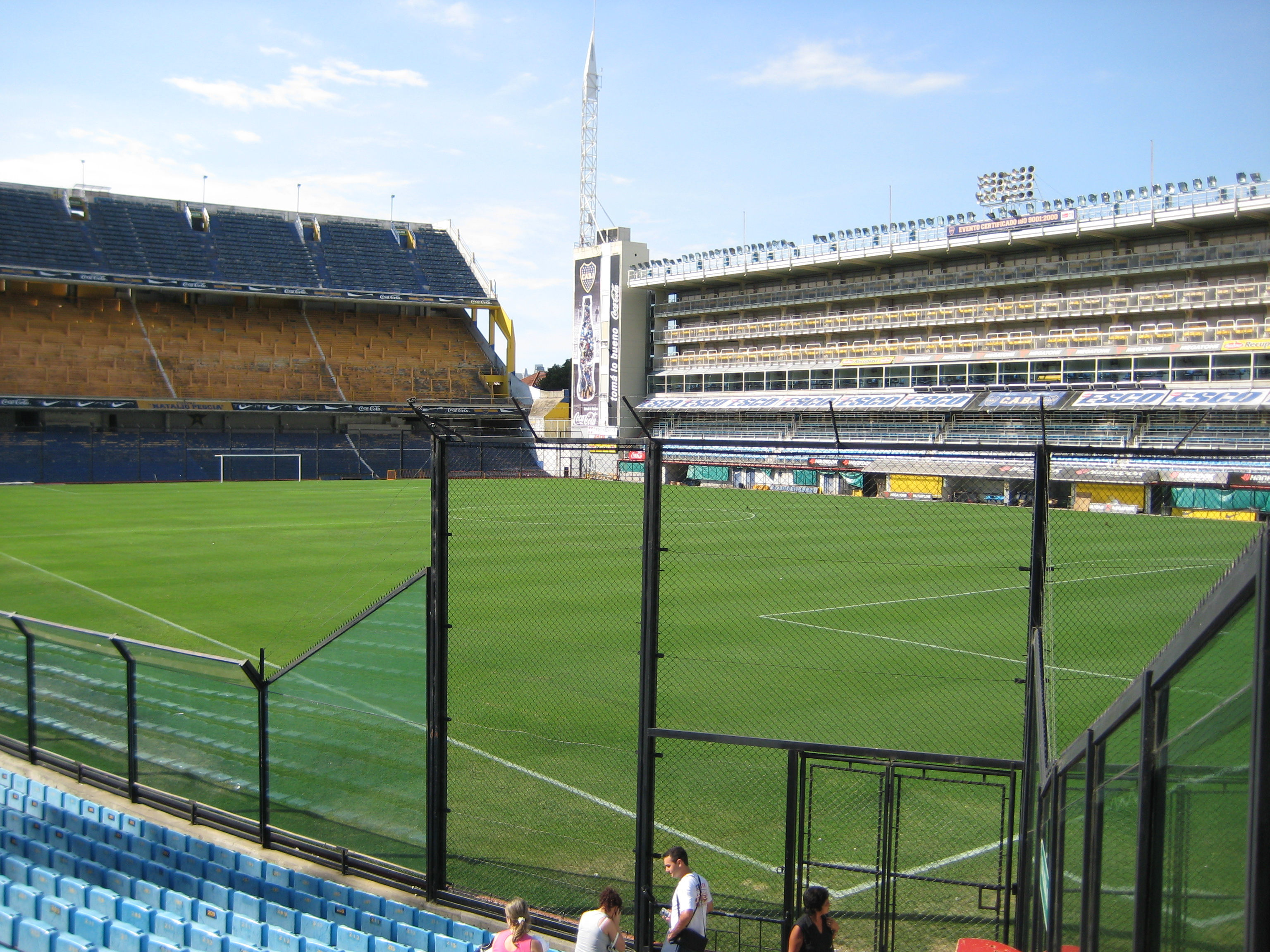 Vista interior del estadio de Boca Juniors, en el Barrio de La Boca, Buenos Aires.